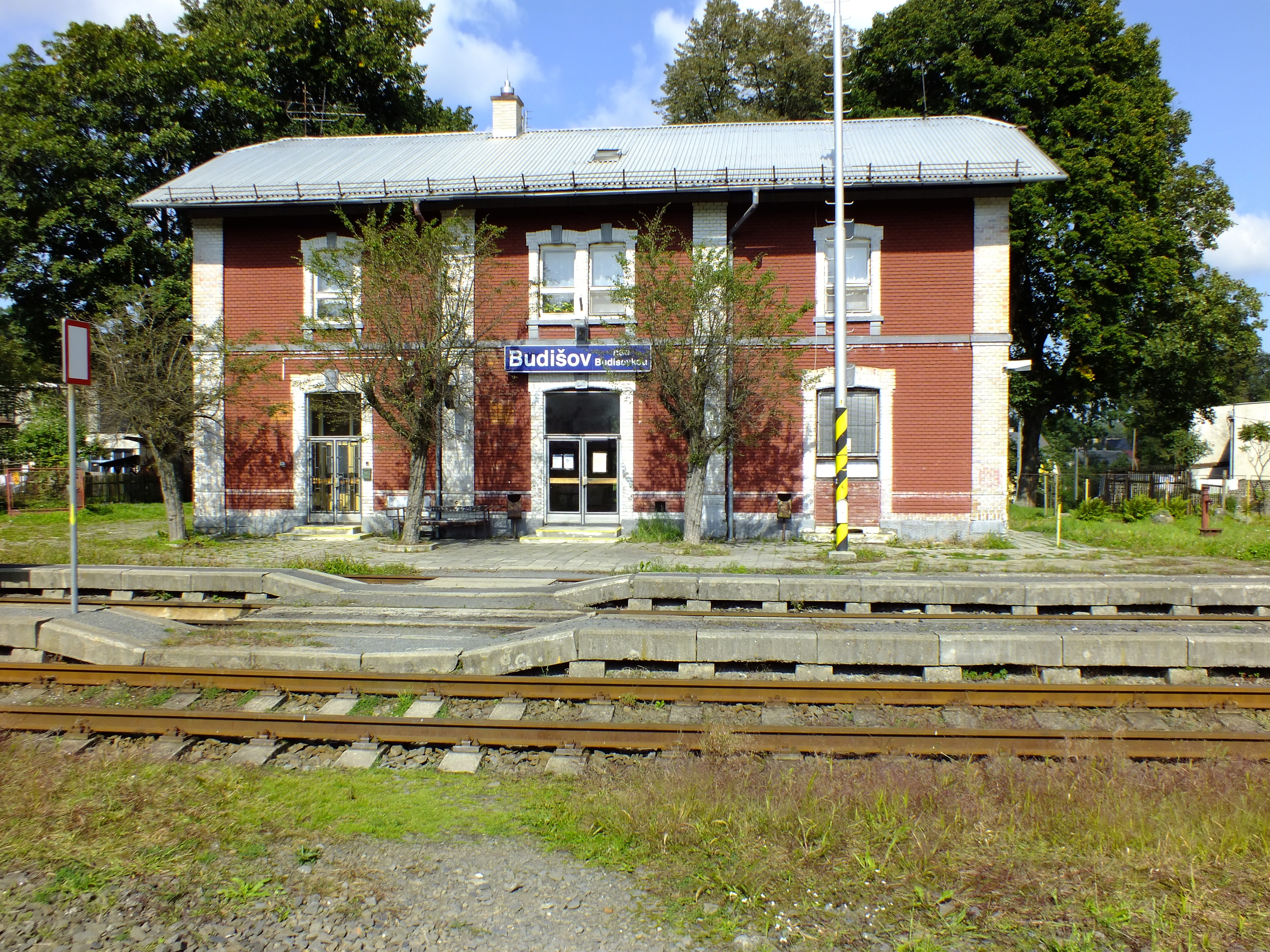 Vlakové nádraží